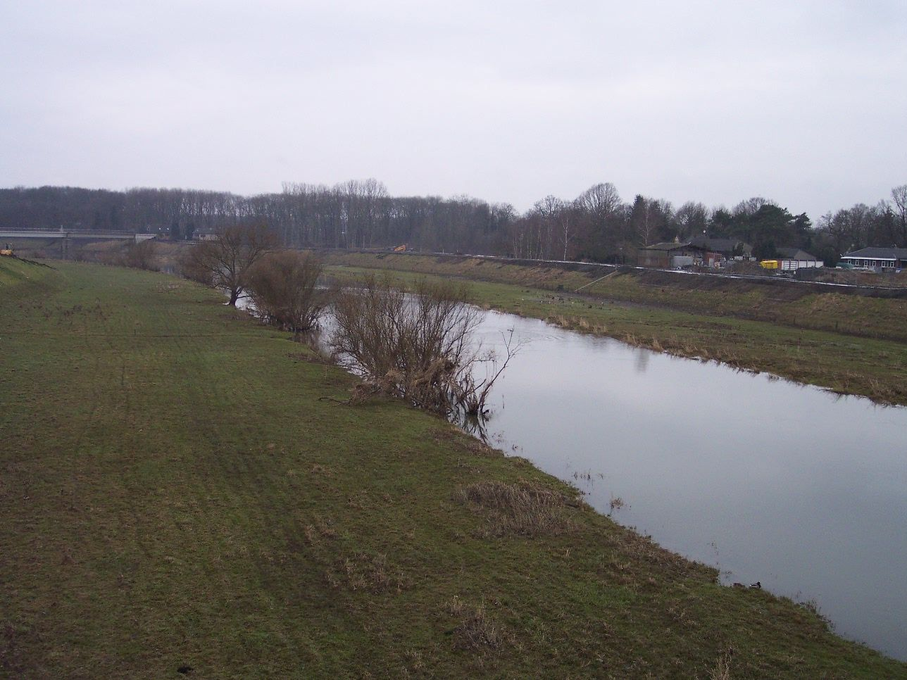 Lippe in Dorsten, Blick flussabwärts, hinten links die Hohenkampbrücke (Fußgängerbrücke)